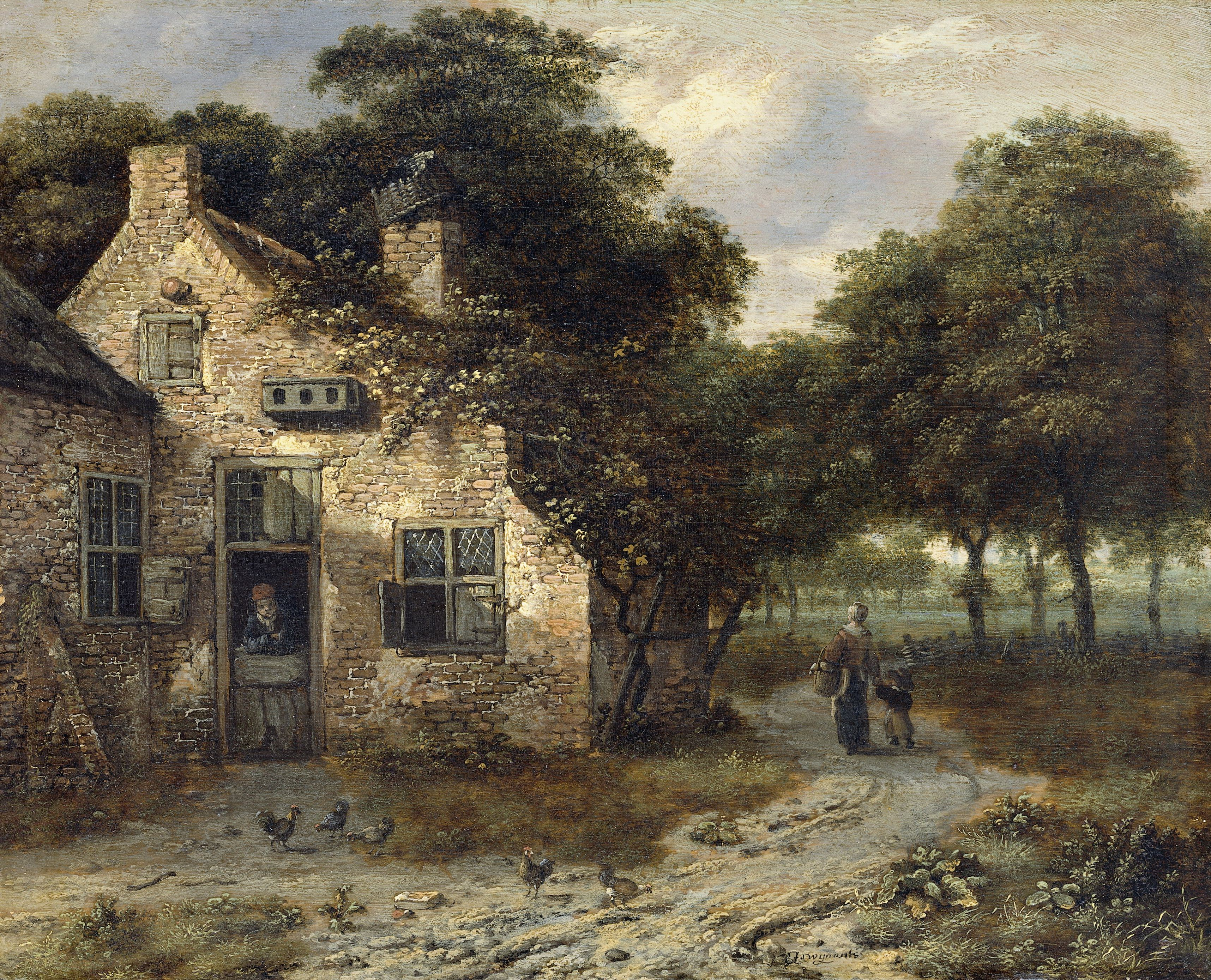 Een boerenwoning begroeid met wijnranken. Een man kijkt over de onderdeur naar buiten waar kippen voor het huis scharrelen. Een vrouw met een kind loopt over een pad langs het huis.